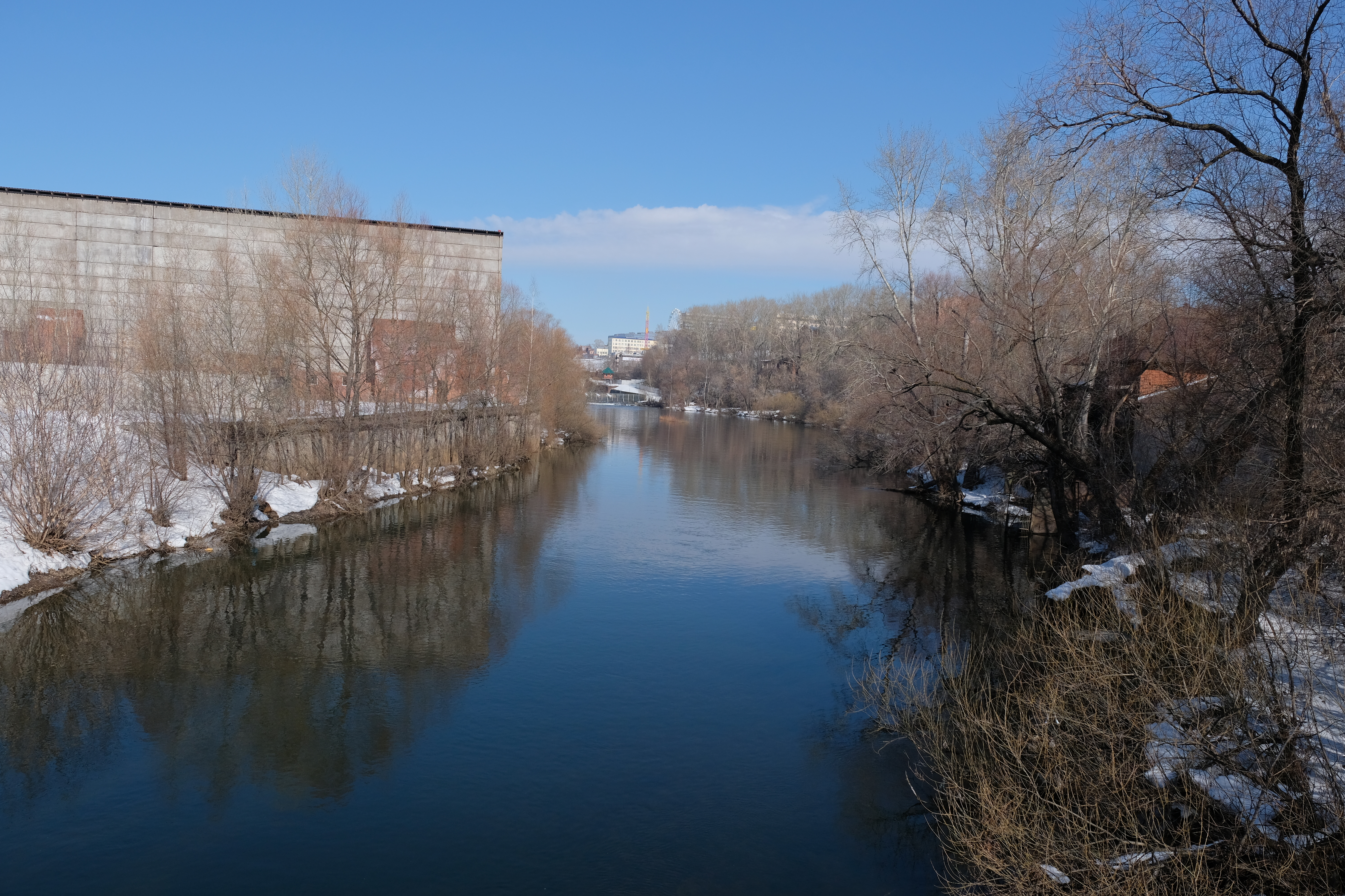 Река Иж в Ижевске после плотины Ижевского пруда